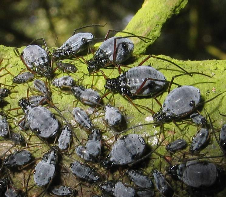 Läuse auf Tannenzweig 9153